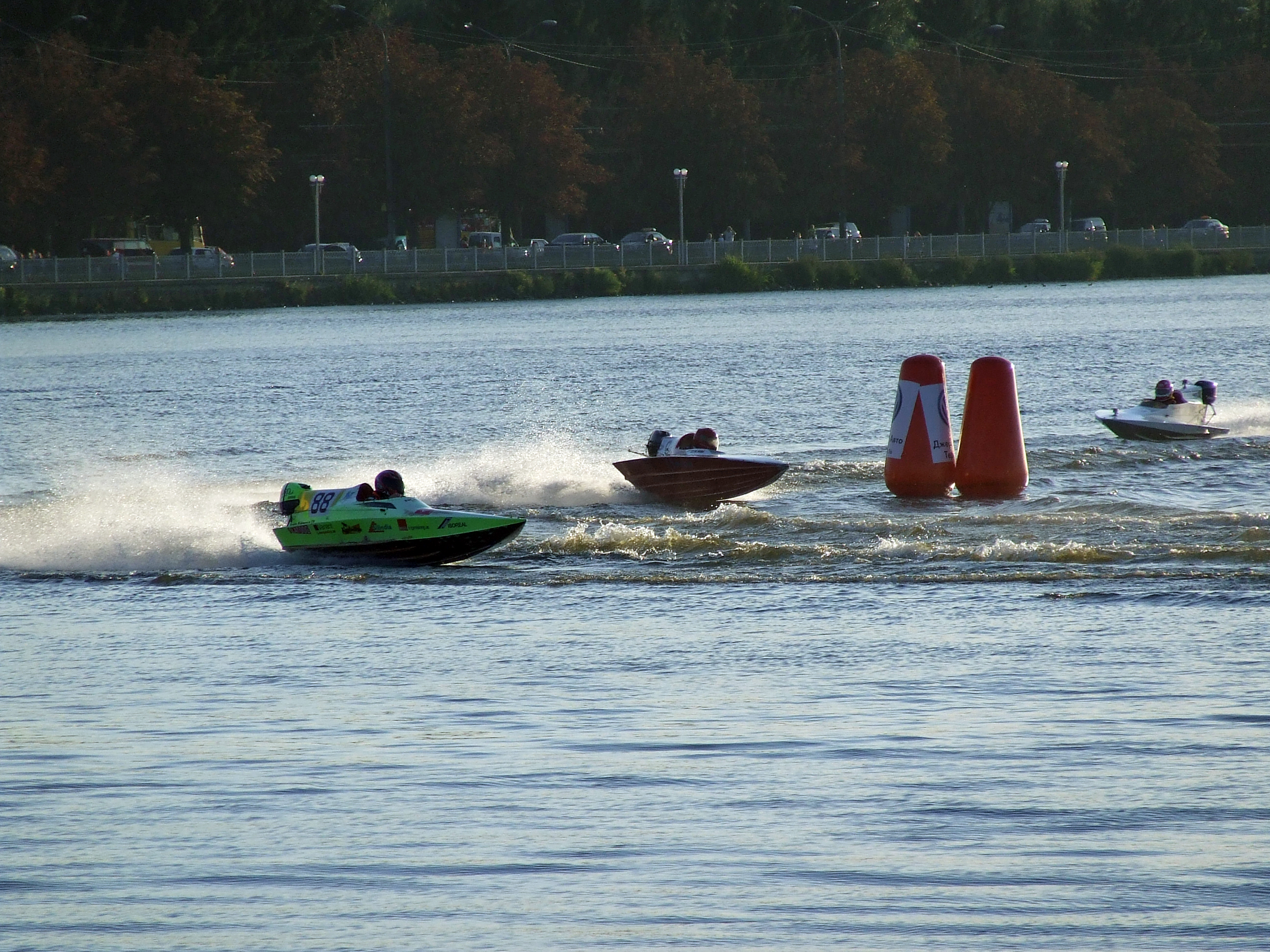 Чемпіонат Європи з водно-моторного спорту в Тернополі: Чемпіонат Європи з водно-моторного спорту в Тернополі